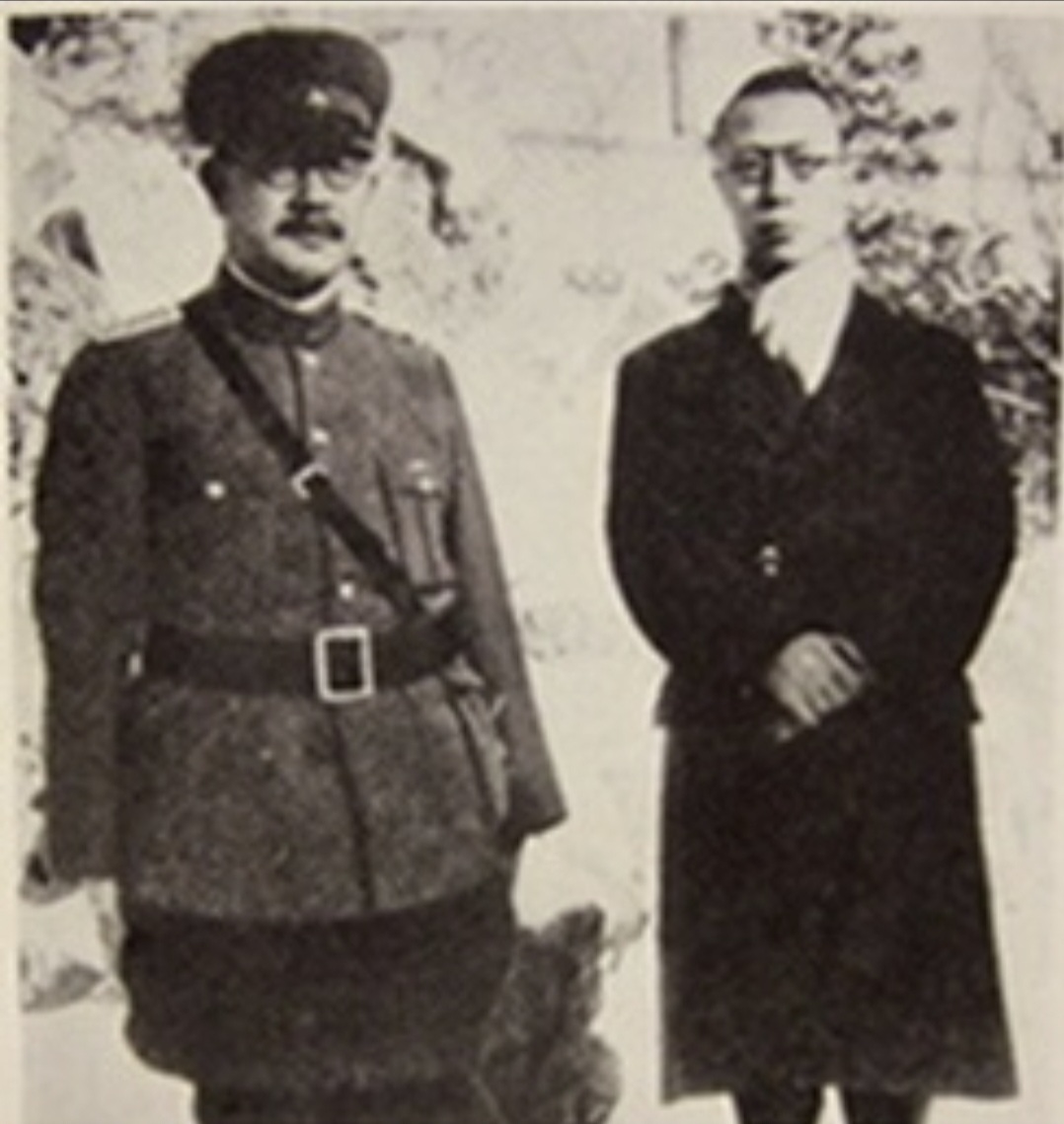 工藤忠と皇帝